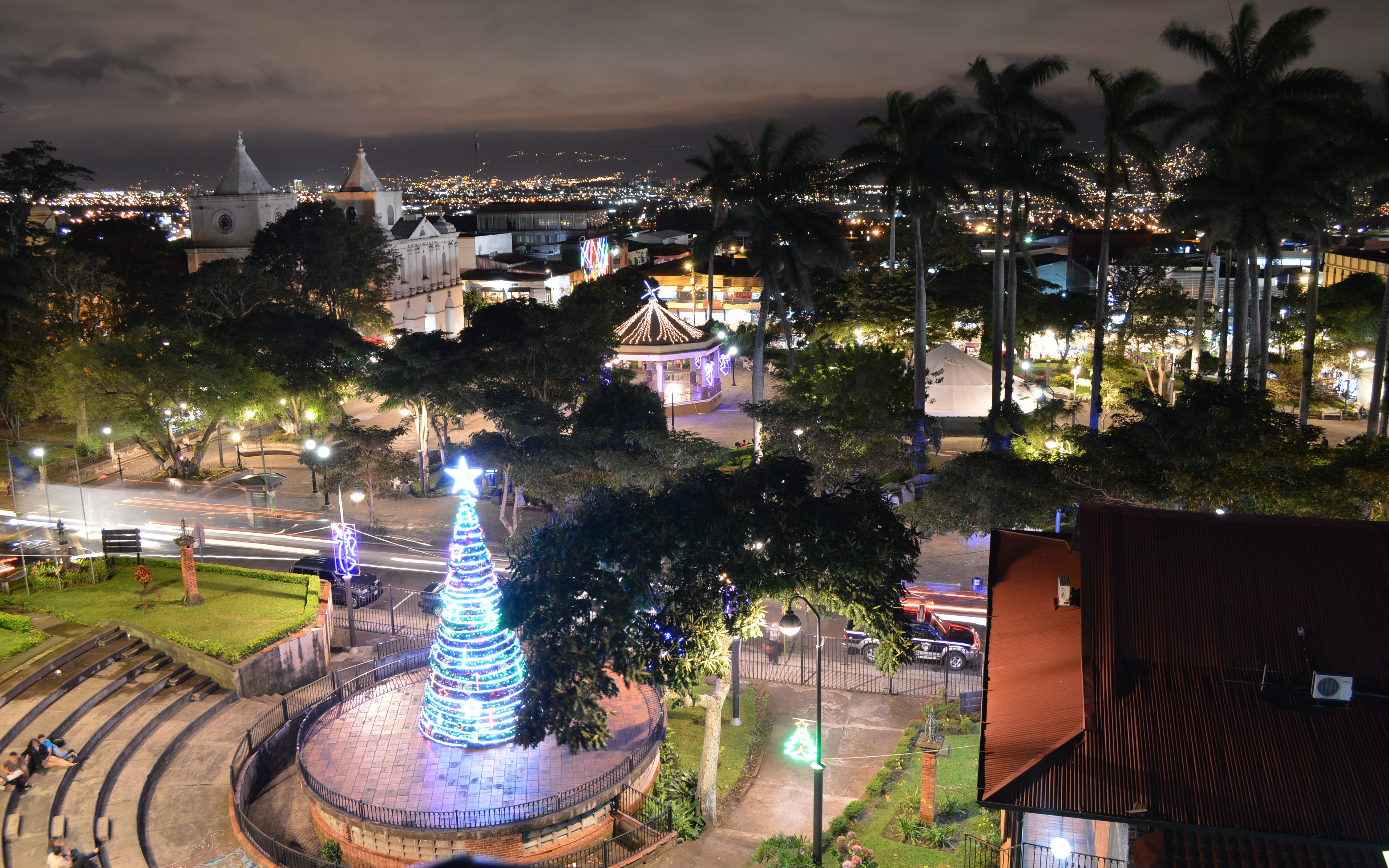 Centro de la Ciudad de Heredia